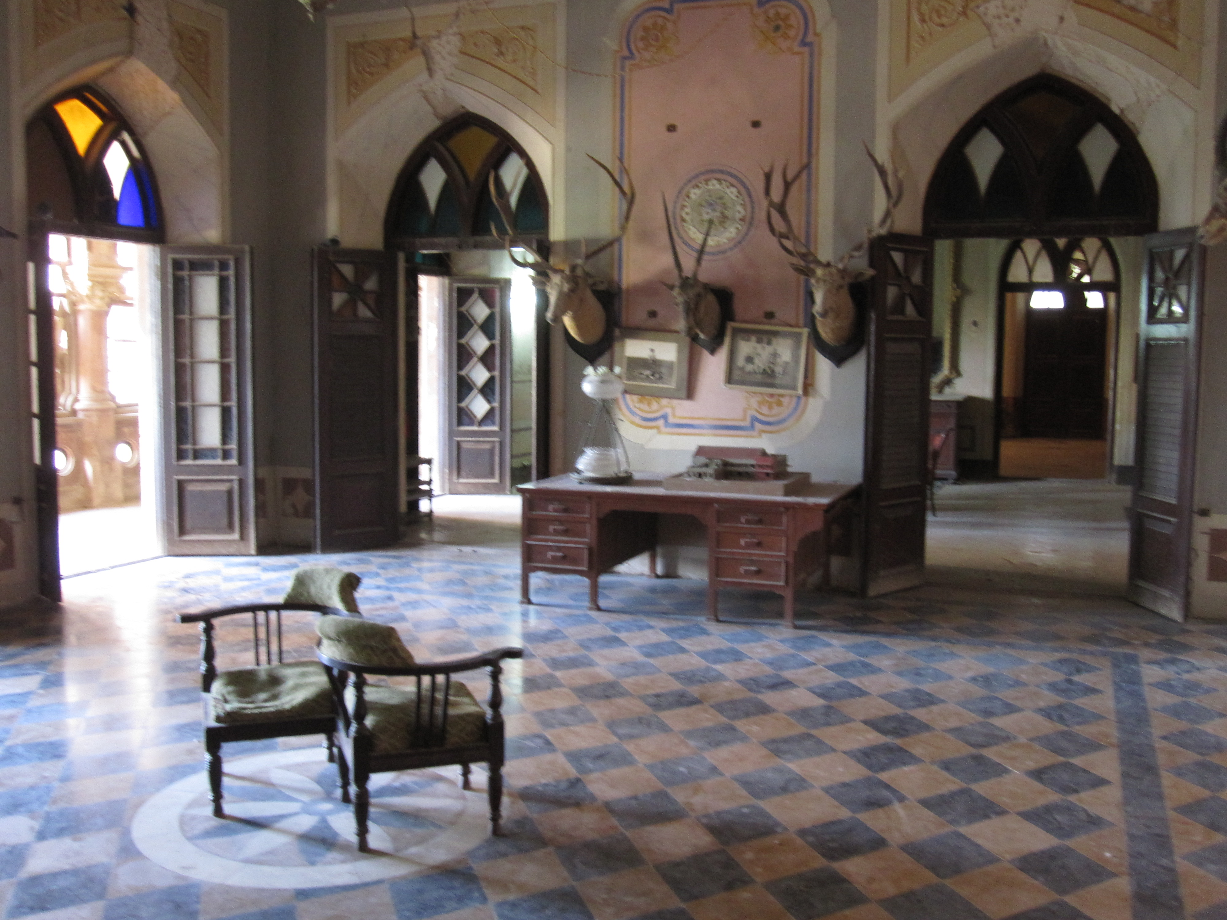 Prag Mahal, Bhuj